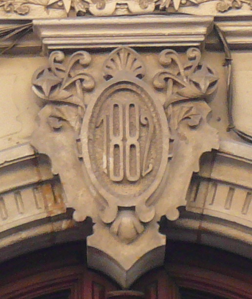 Data a la llinda de la casa de carrer de Pelai 18 de Barcelona